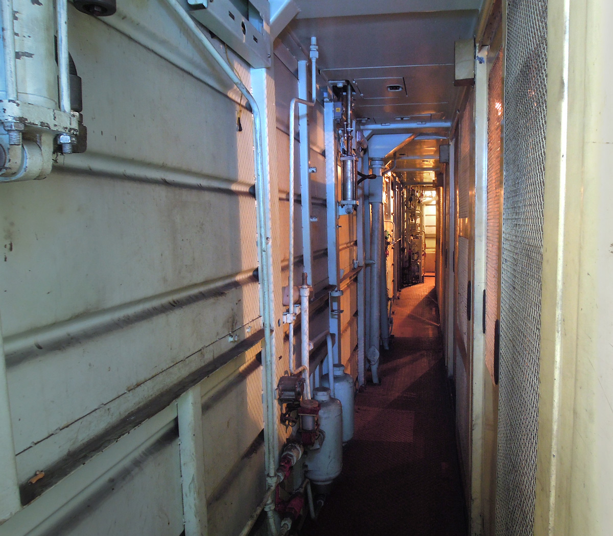 Продольный проход электровоза ДЭ1Вид от входной двери в хвост секции